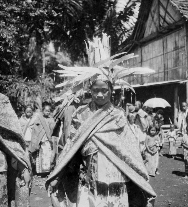 Negatief. Dansende vrouw te Muara Empajang, Pasemah, Zuid-Sumatra